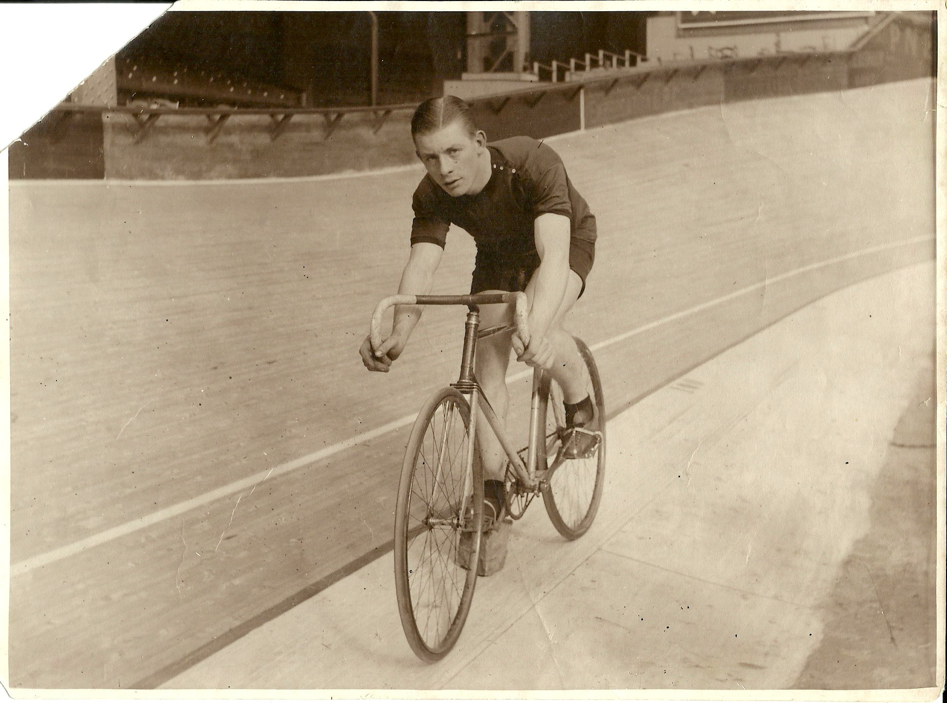 Jeux Olympiques 1924